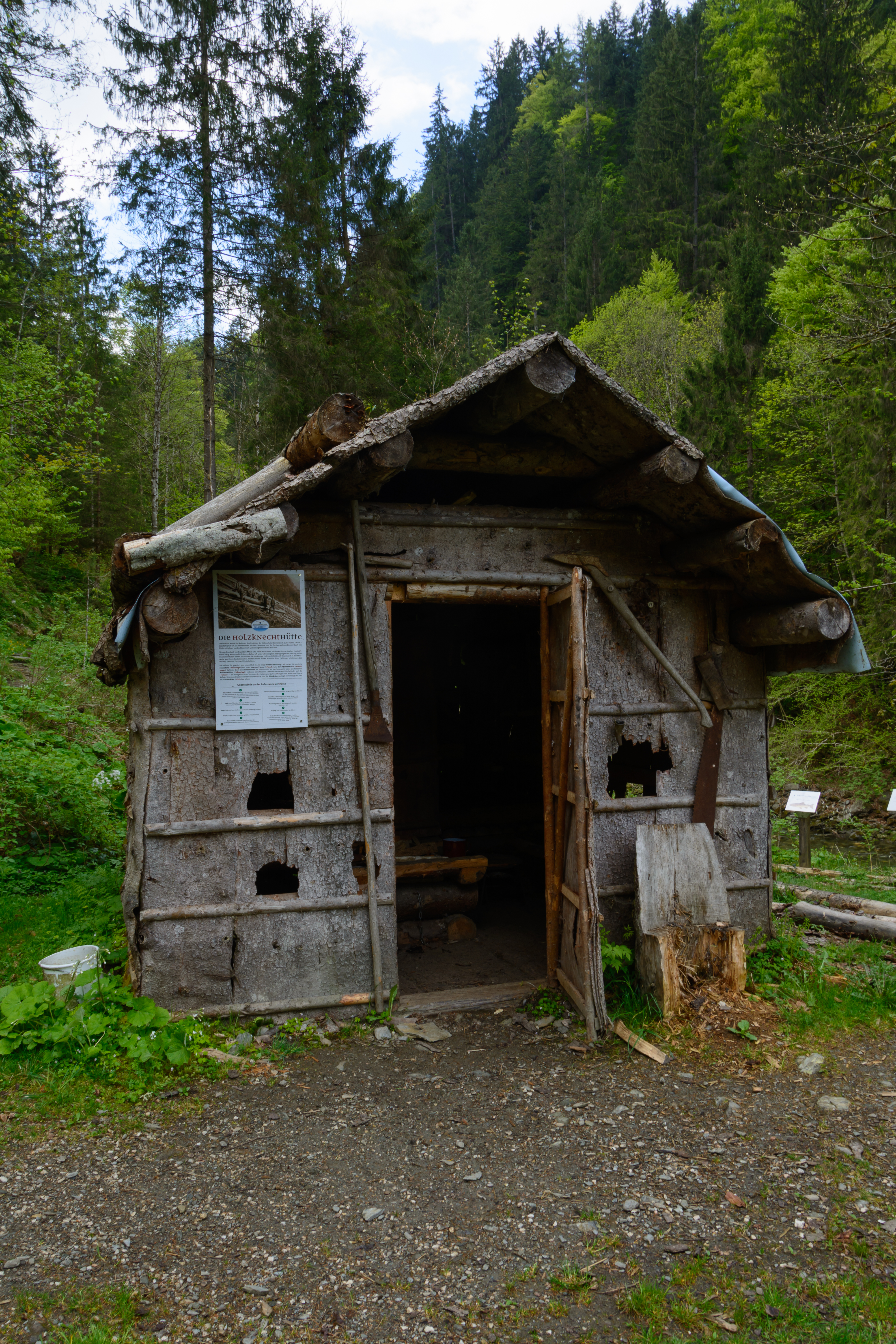 Nachgebaute Holzknechthütte in der Donnersbacher Klamm This media shows the natural monument in Styria with the ID 966.